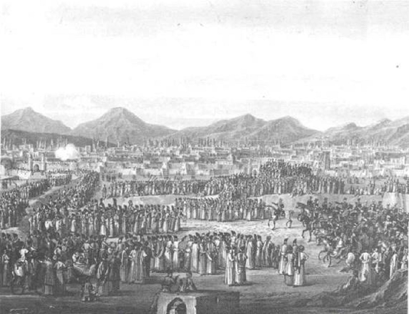 Торжественное вступление графа Паскевича в Тавриз